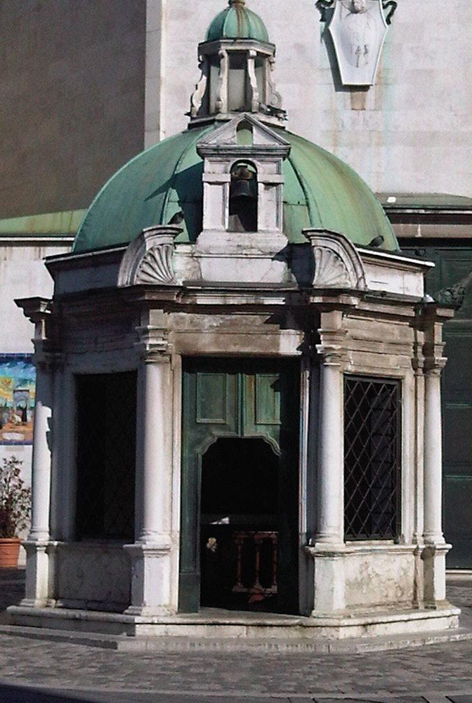 Tempietto cinquecentesco del Bramante dedicato a Sant'Antonio nella città di Rimini, nel luogo in cui la tradizione vuole che il Santo abbia compiuto il Miracolo eucaristico della mula